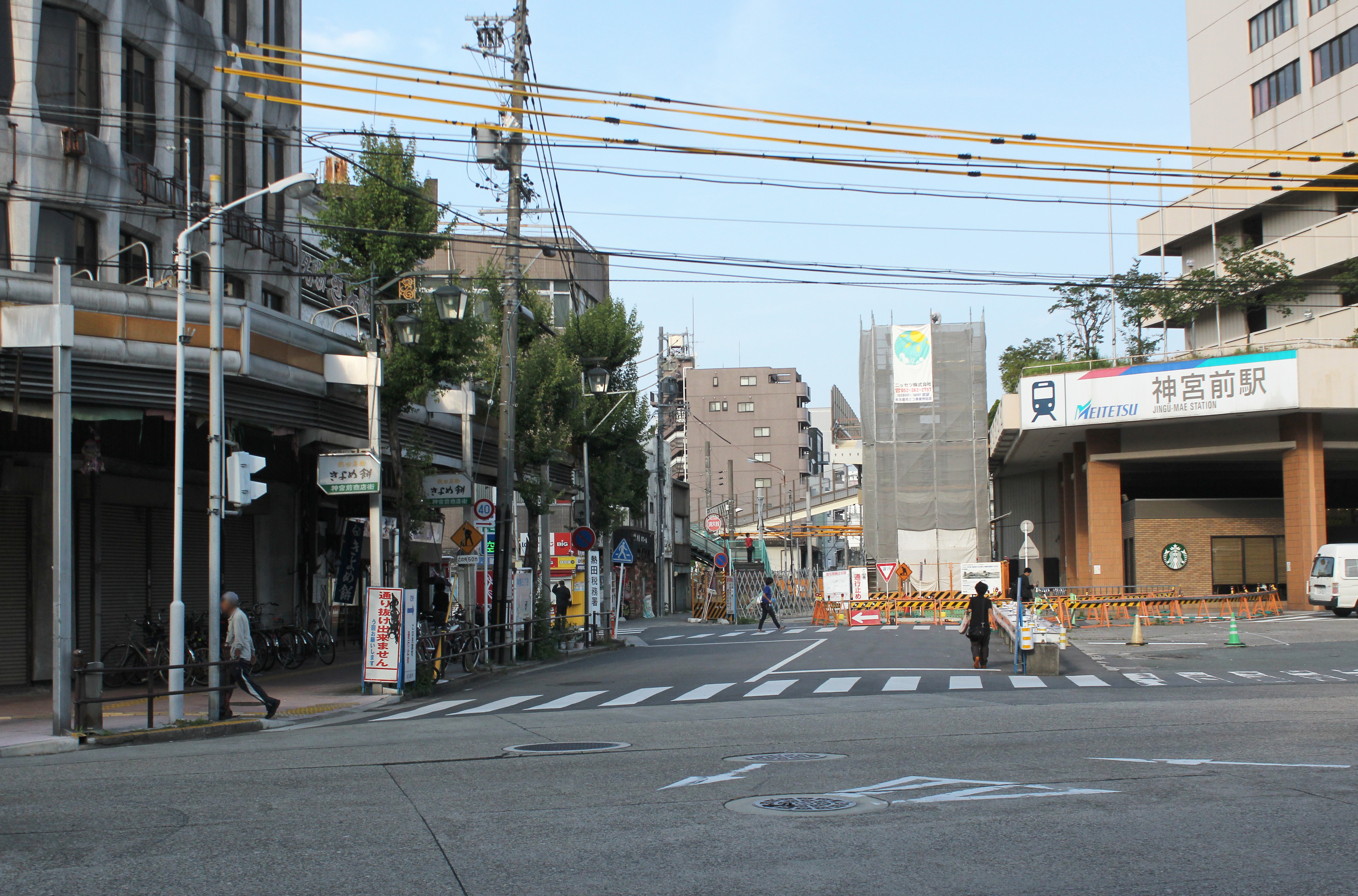 山手グリーンロードの終点付近（熱田神宮東門付近）